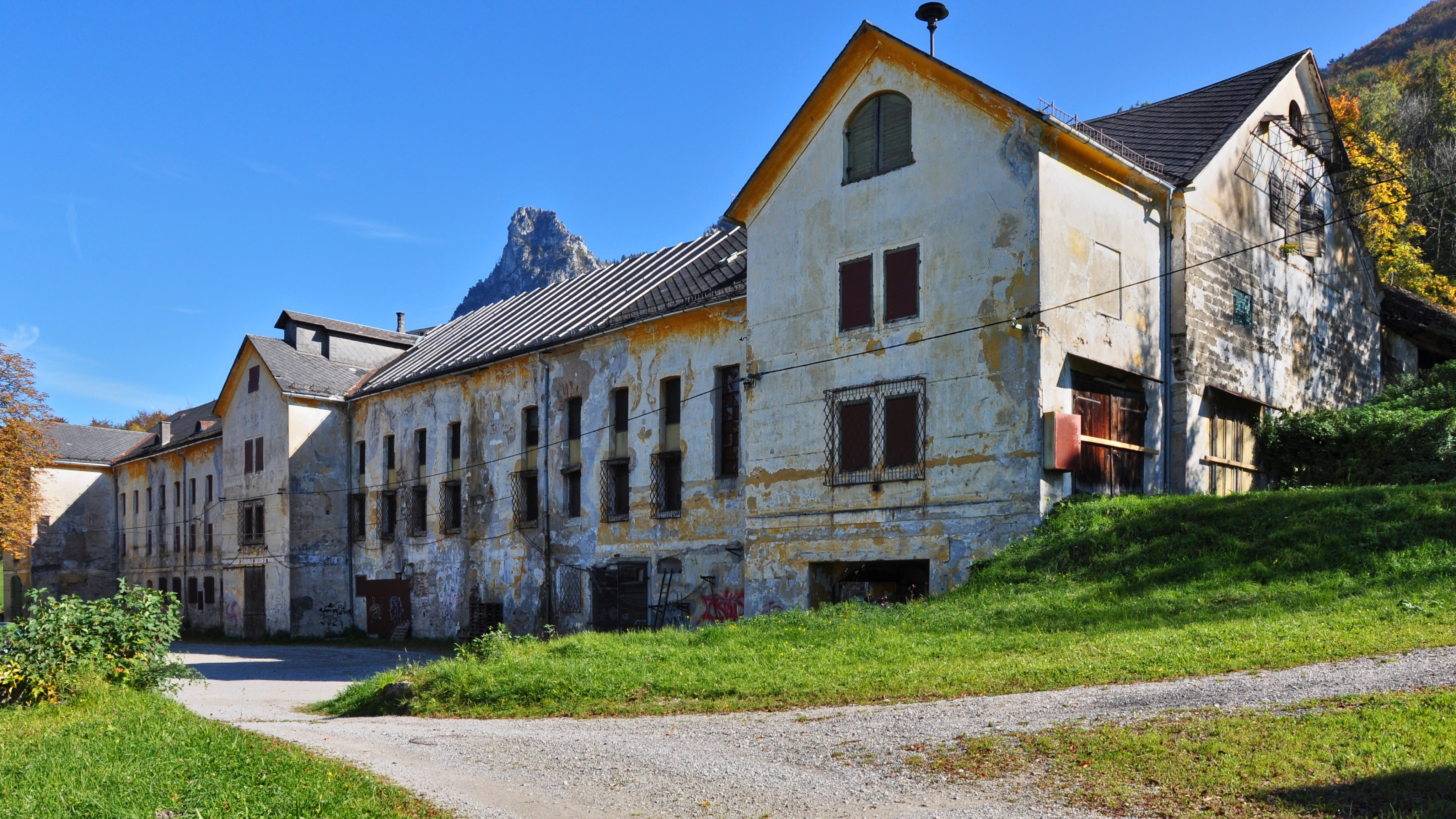 Ehem. Brauereigebäude im Ortsteil Guggenthal der Gemeinde Koppl